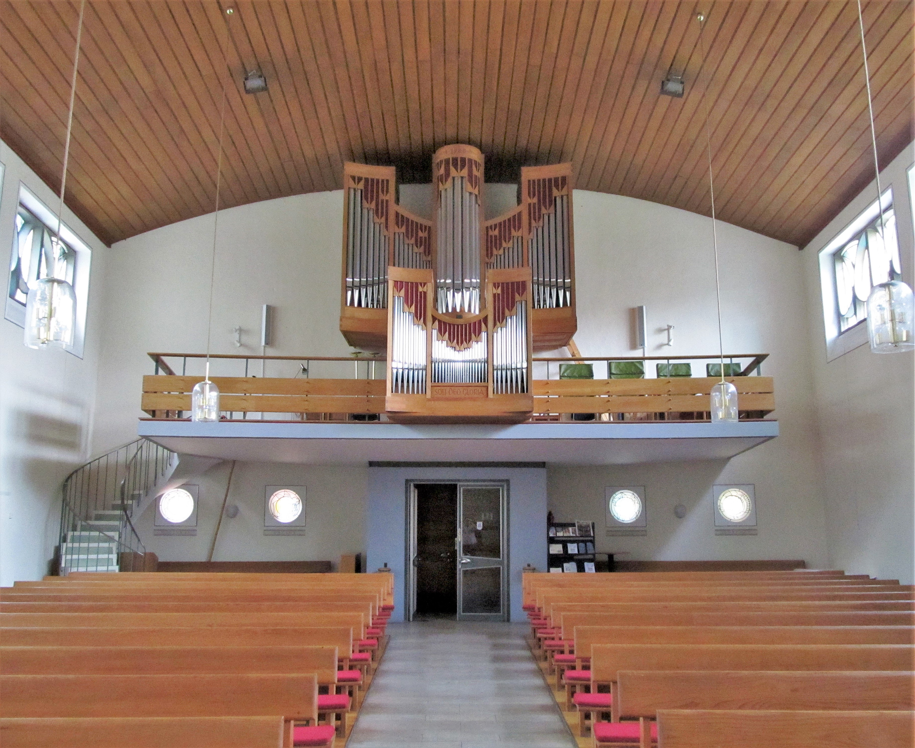 Blick ins Innere der protestantischen Christuskirche in Schwarzenacker, einem Stadtteil von Homburg, Saarland